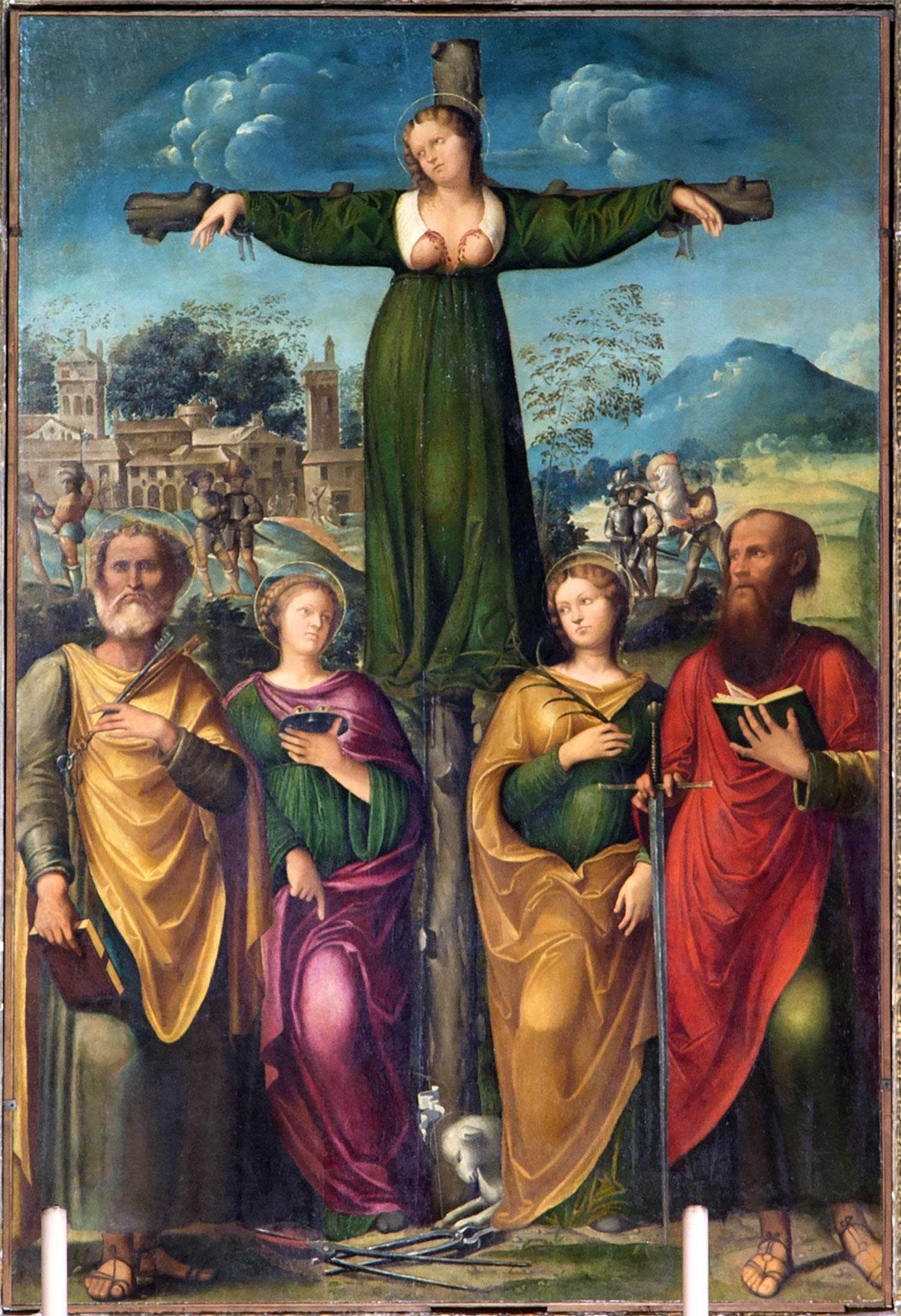 Martirio di Sant’Agata